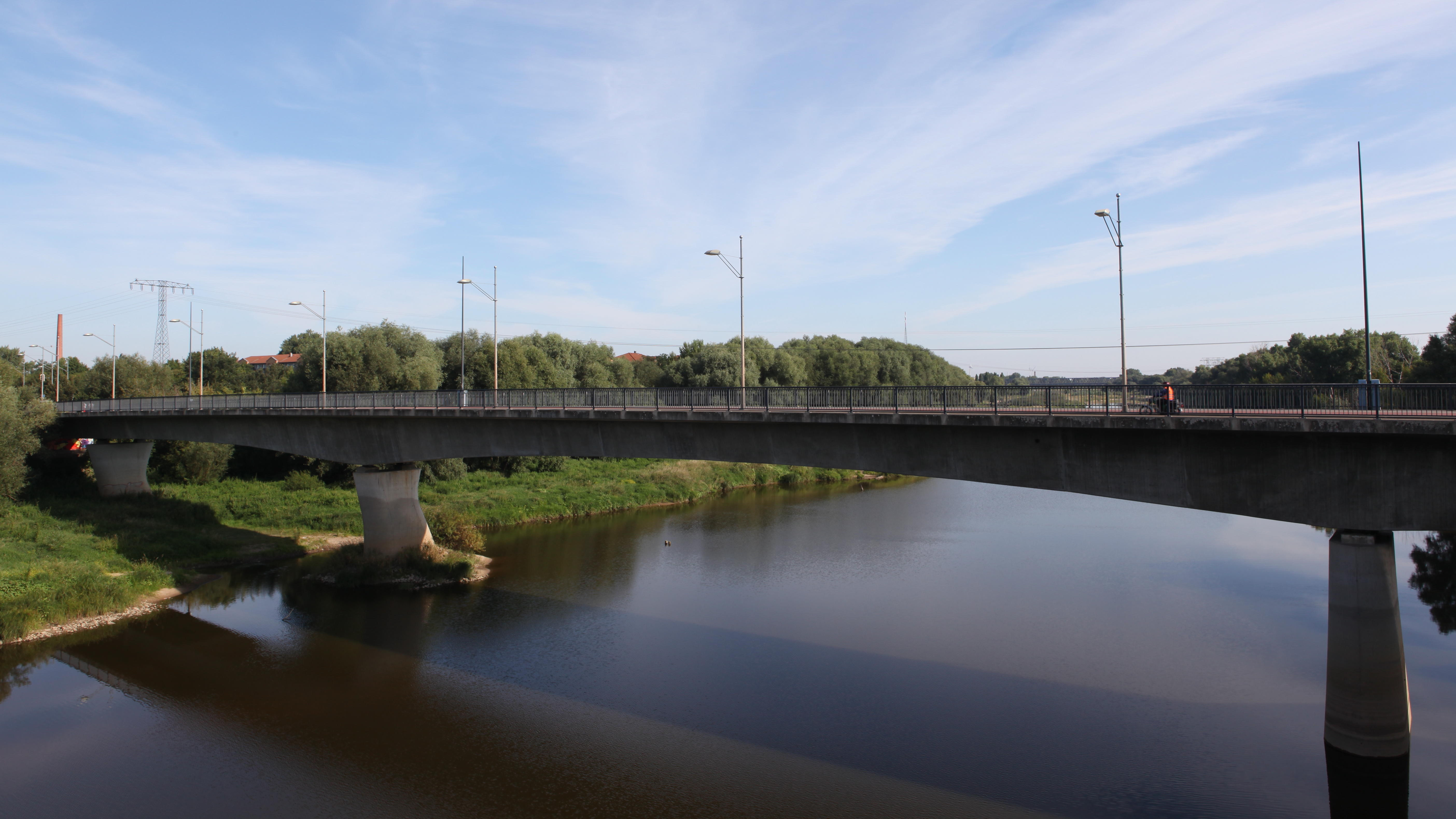 Nördliche Brücke des Friedens über die Alte Elbe in Magdeburg